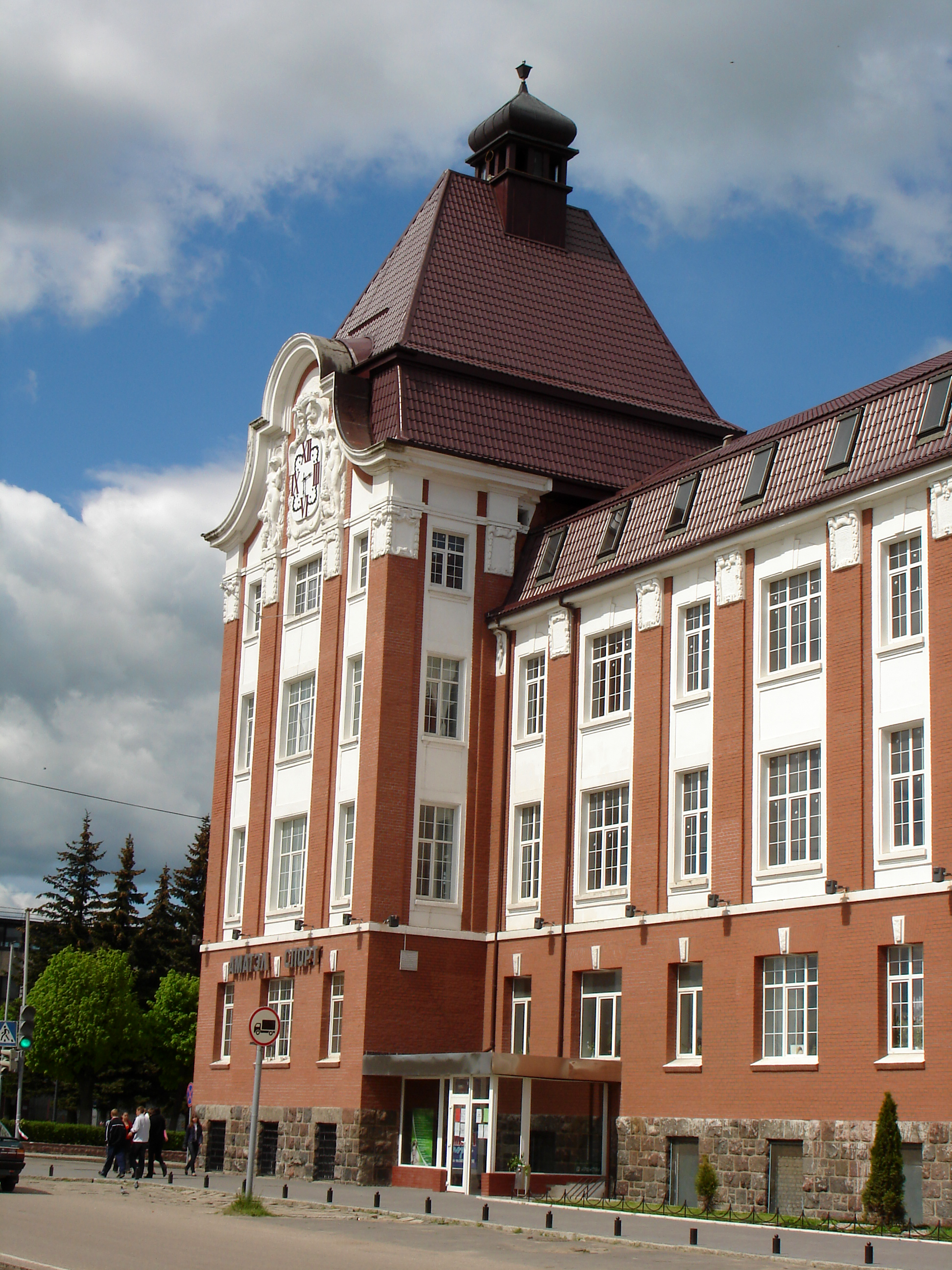 Russische Föderation: Gebäude in der Innenstadt von Gusev (Oblast Kaliningrad)